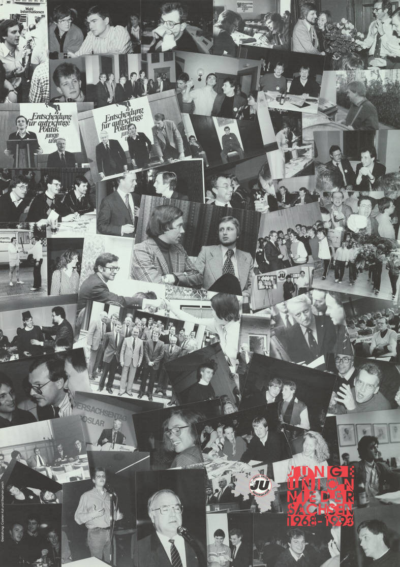 Junge Union Nieder Sachsen 1968-1993 Abbildung: Fotocollage Plakatart: Kandidaten-/Personenplakat mit Porträt Künstler_Grafiker: Carsten Kuil, Stefan Lerch Auftraggeber: JU Niedersachsen Objekt-Signatur: 10-028 : 338 Bestand: Plakate von Jugendorganisationen der Parteien (10-028) GliederungBestand10-18: Plakate von Jugendorganisationen der Parteien (10-028) » CDU » Personen- und Kandidatenplakate Lizenz: KAS/ACDP 10-028 : 338 CC-BY-SA 3.0 DE